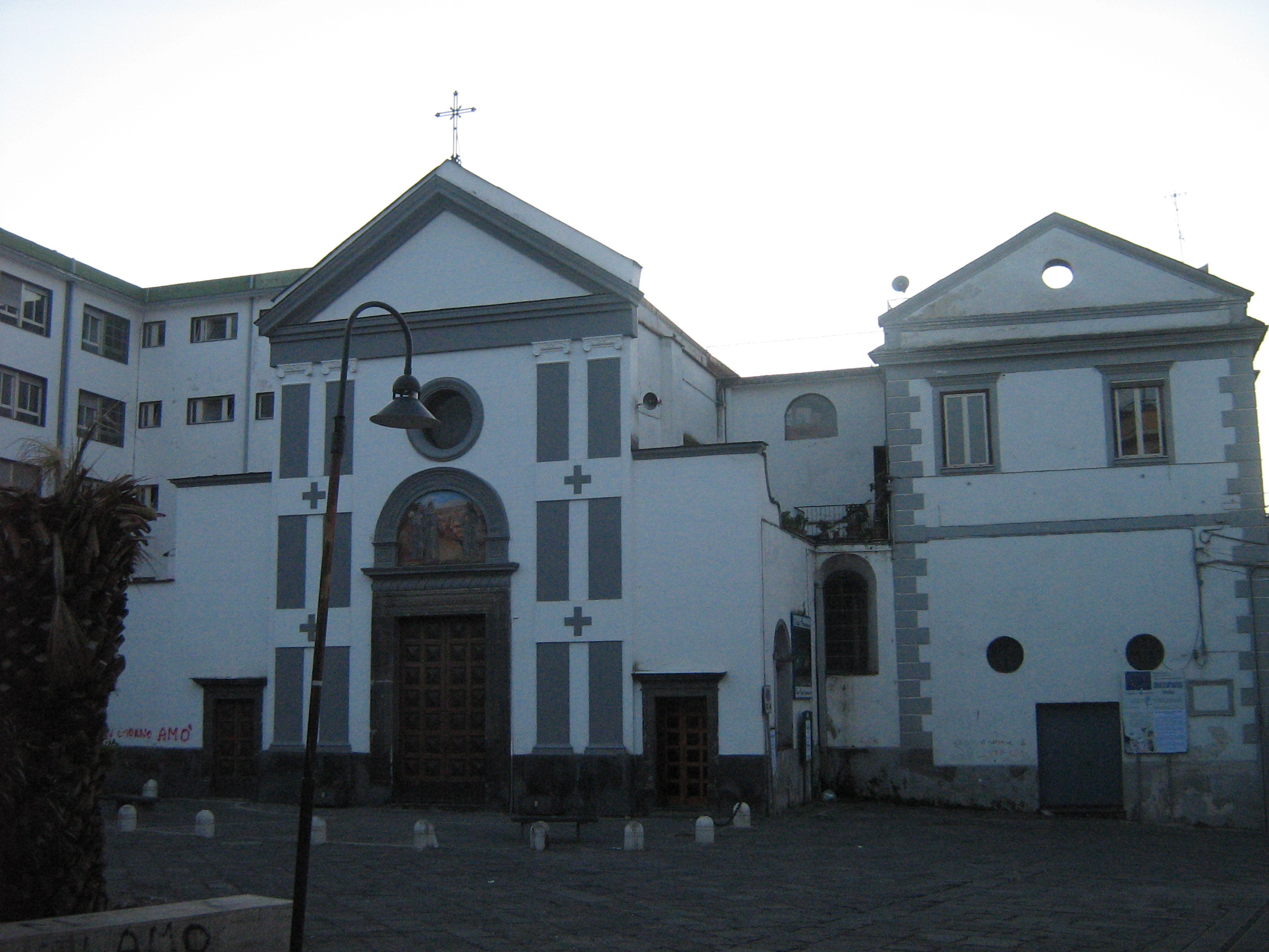 Autore Lusb 11-01-2009